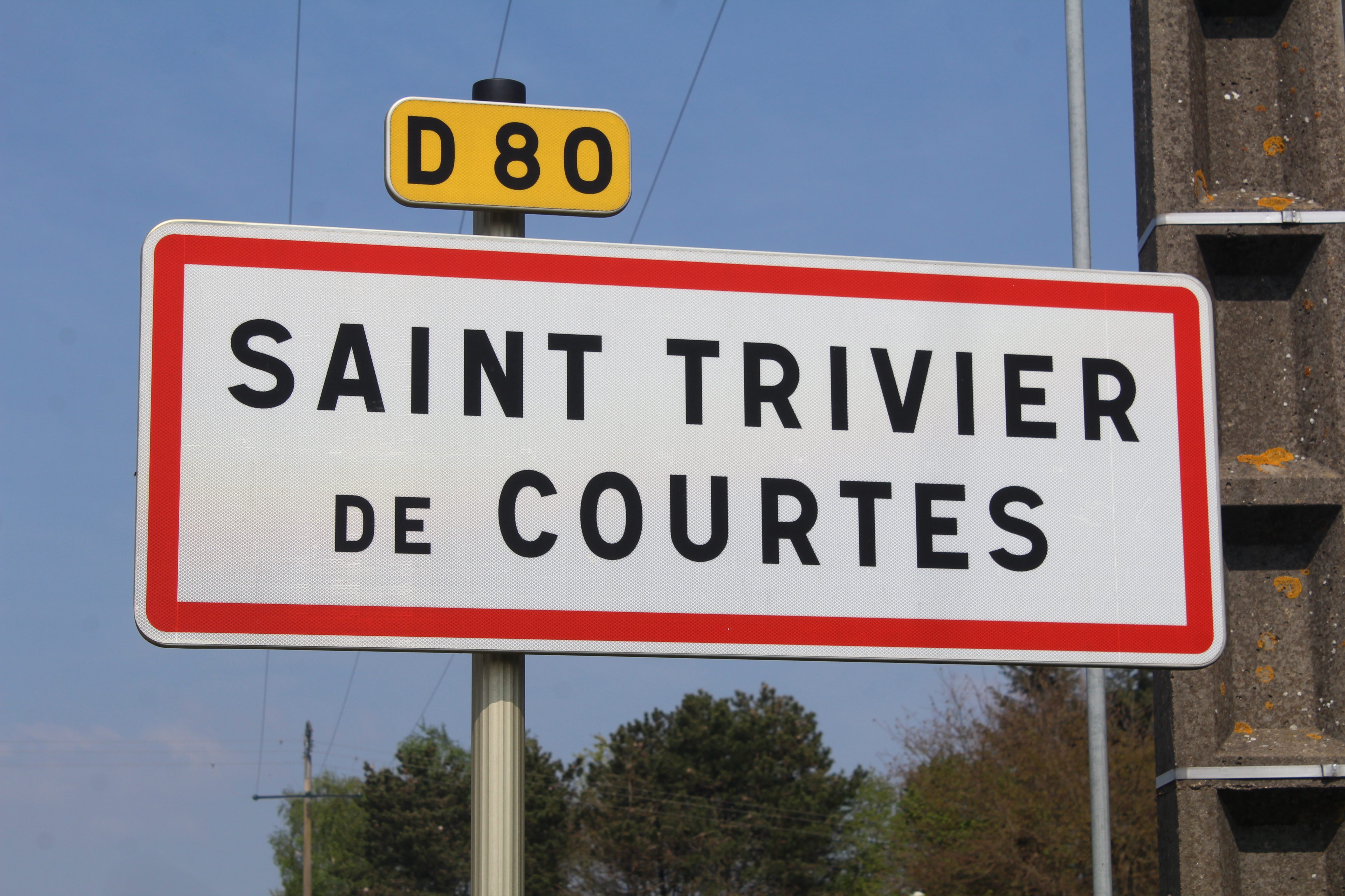 Panneau d'entrée dans Saint-Trivier-de-Courtes.